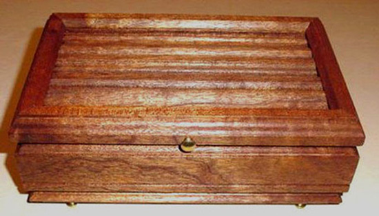 peça em andiroba